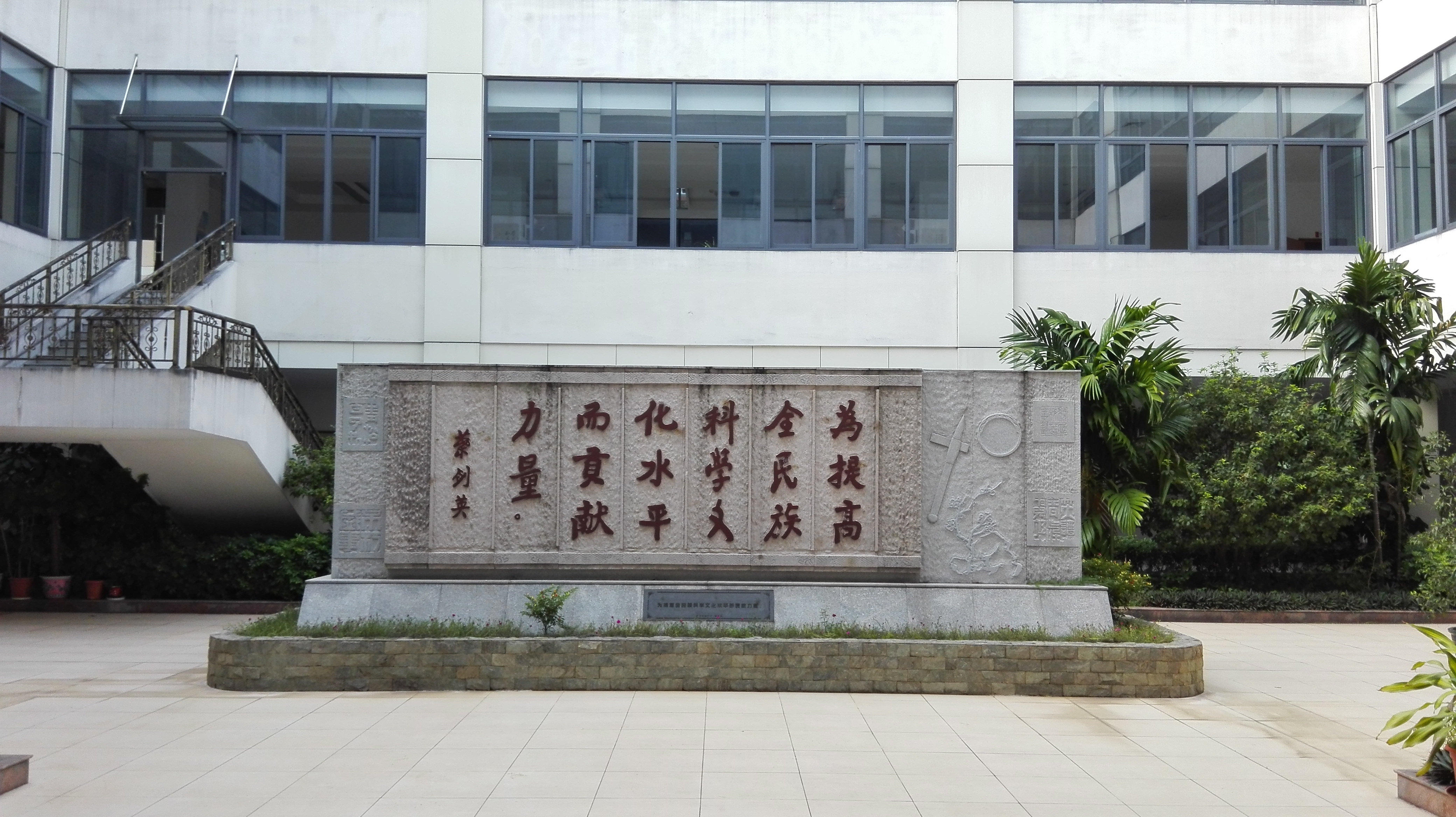 两格窗户因为拍到了人所以涂成黑色PS过